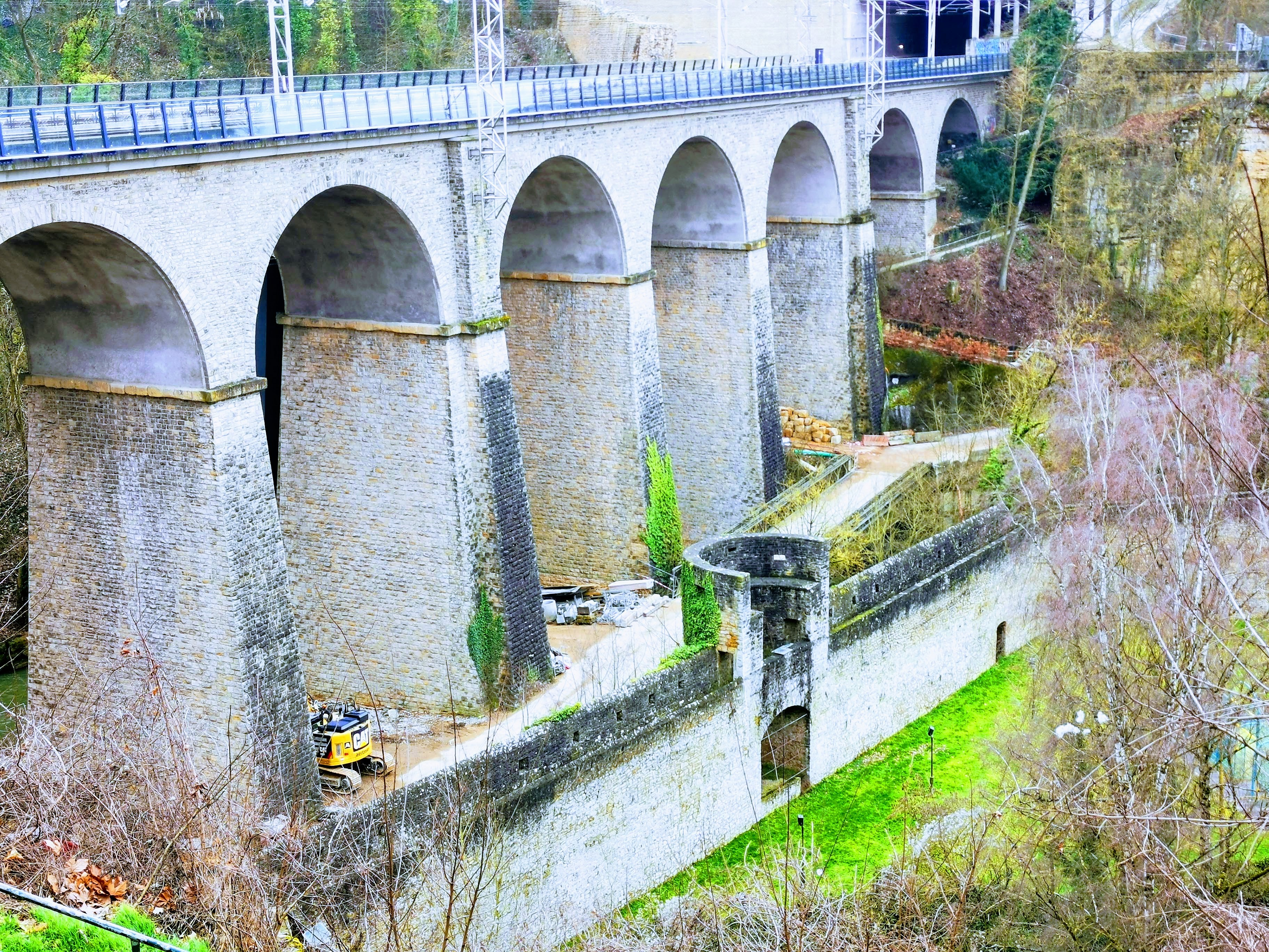 Luxembourg-Grund. Mur médiéval (dit Maierchen) avec chemin de ronde. Le mur faisait partie de la 3e enceinte de la Ville de Luxembourg et fut construit au XVe siècle. À l'arrière-plan le Viaduc de Pulvermuhl.